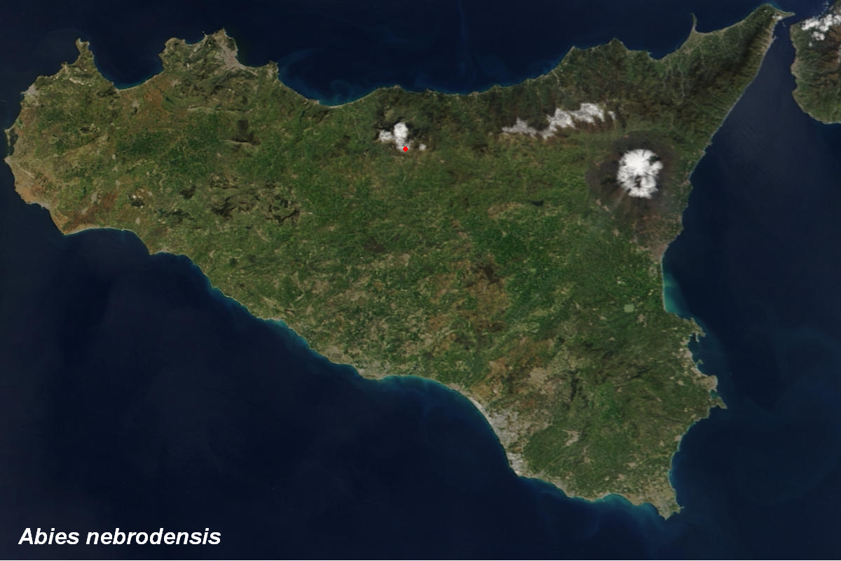 Range map of Abies nebrodensis